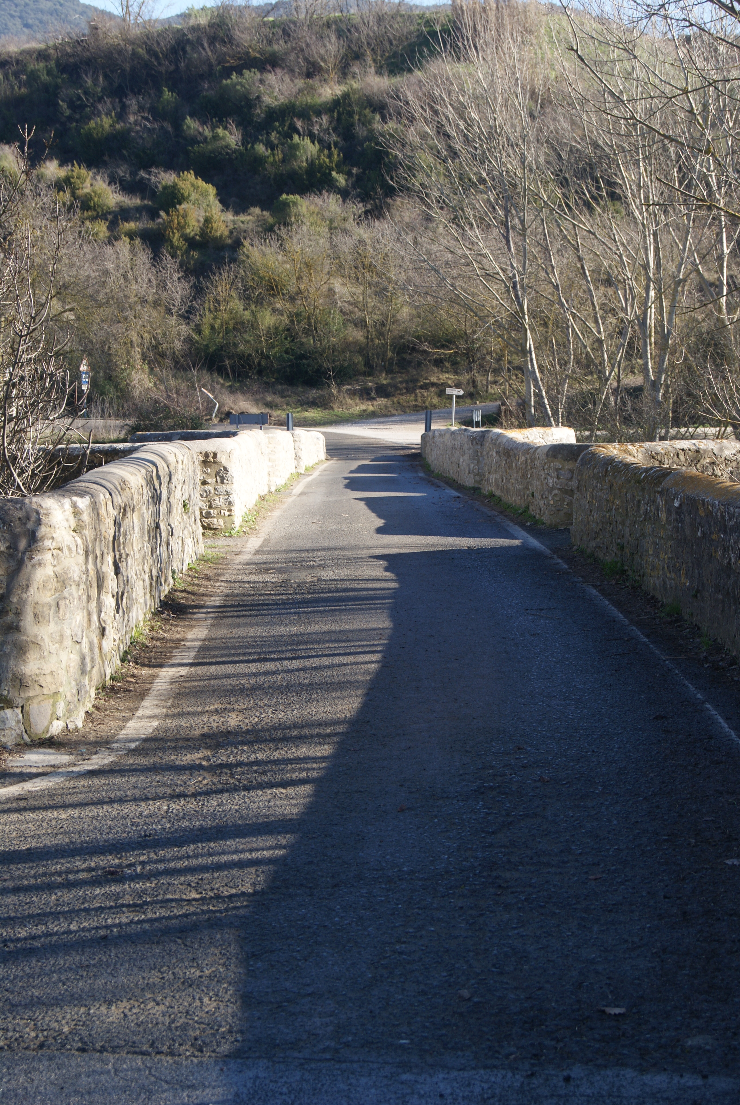 Puente medieval de Belascoáin sobre el Arga